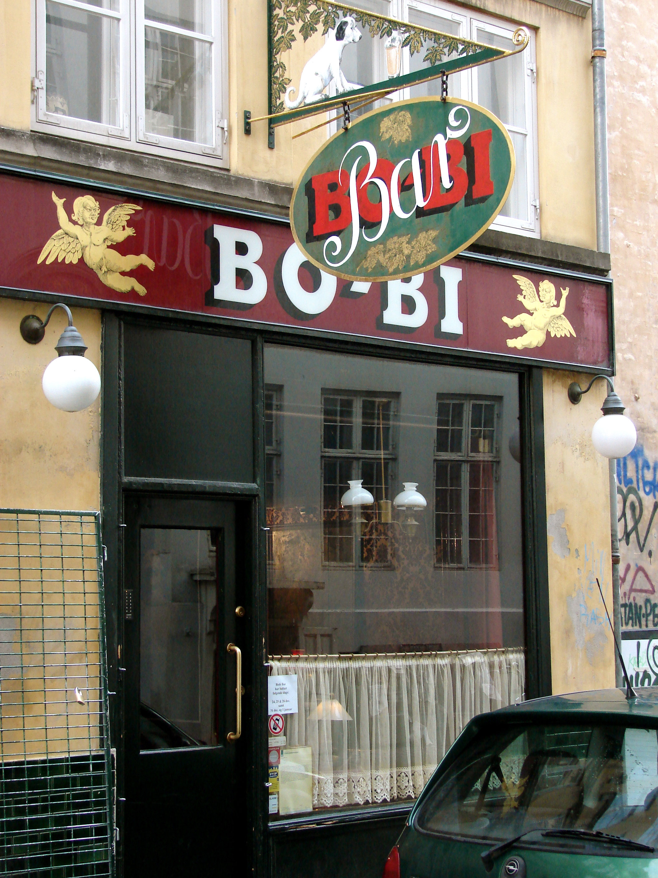 Bo-Bi Bar, København